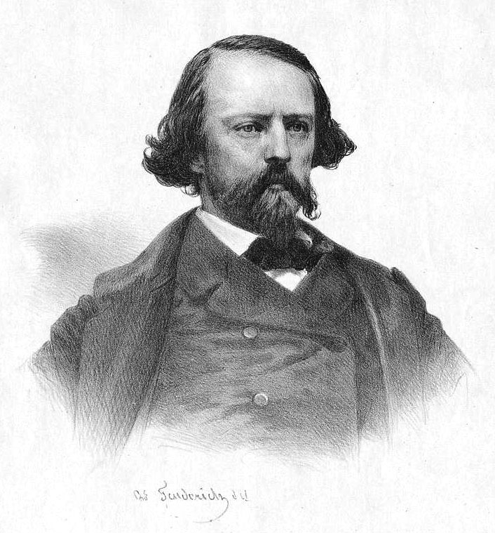 Portrait of Gaston de Raousset-Boulbon